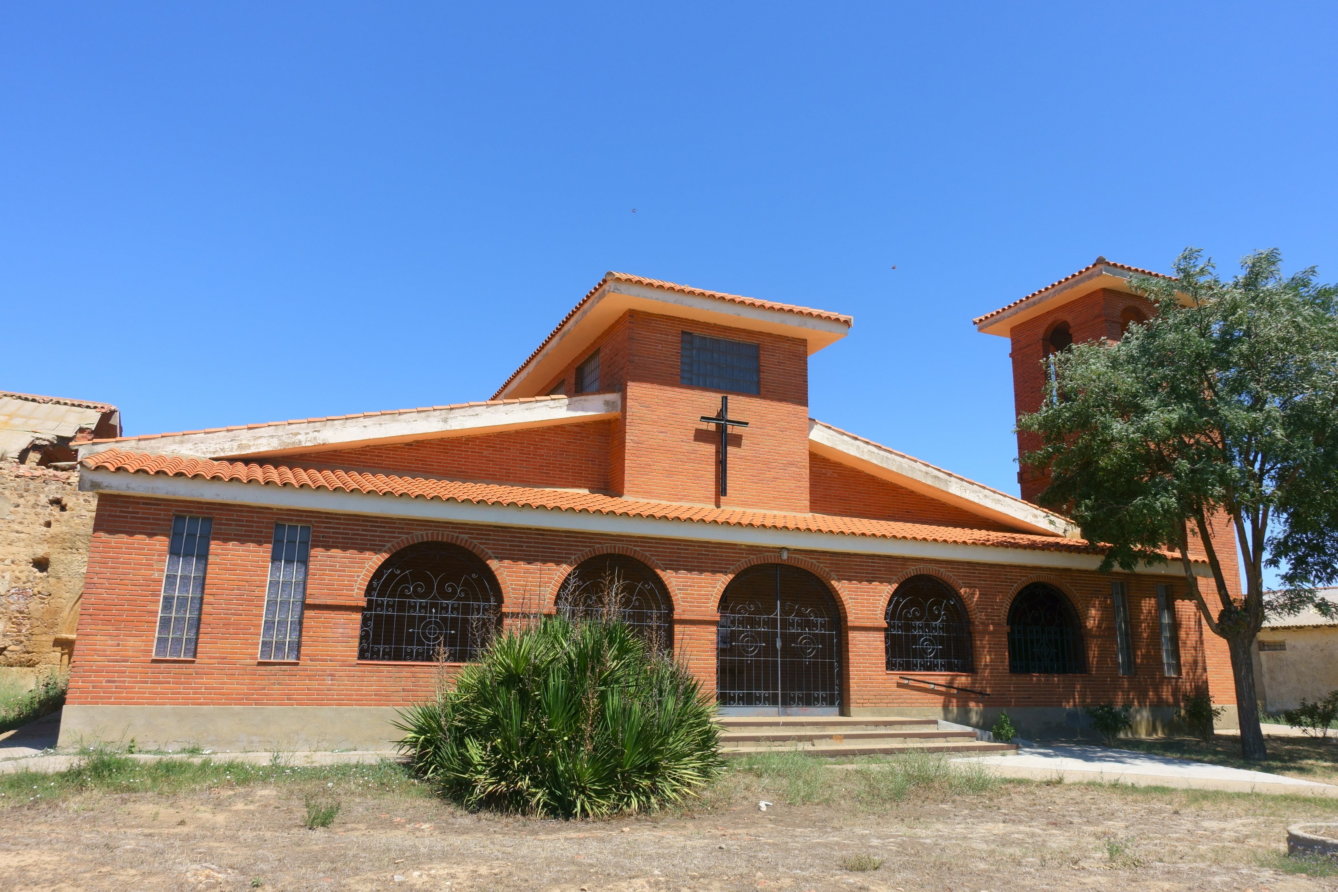 Iglesia de la Asunción de Nuestra Señora, Quintanilla del Monte (Zamora, España).